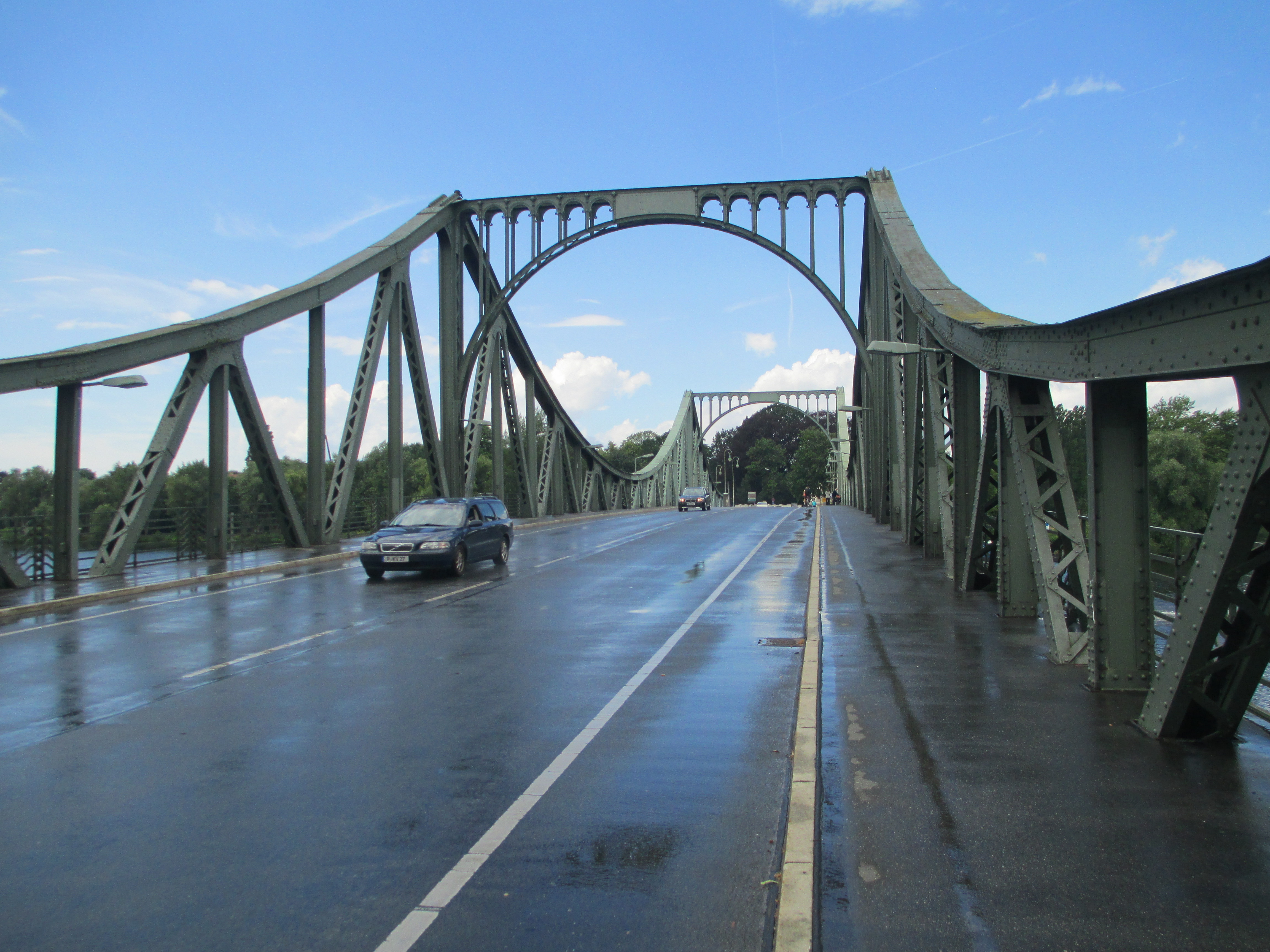 גשר גליניקה